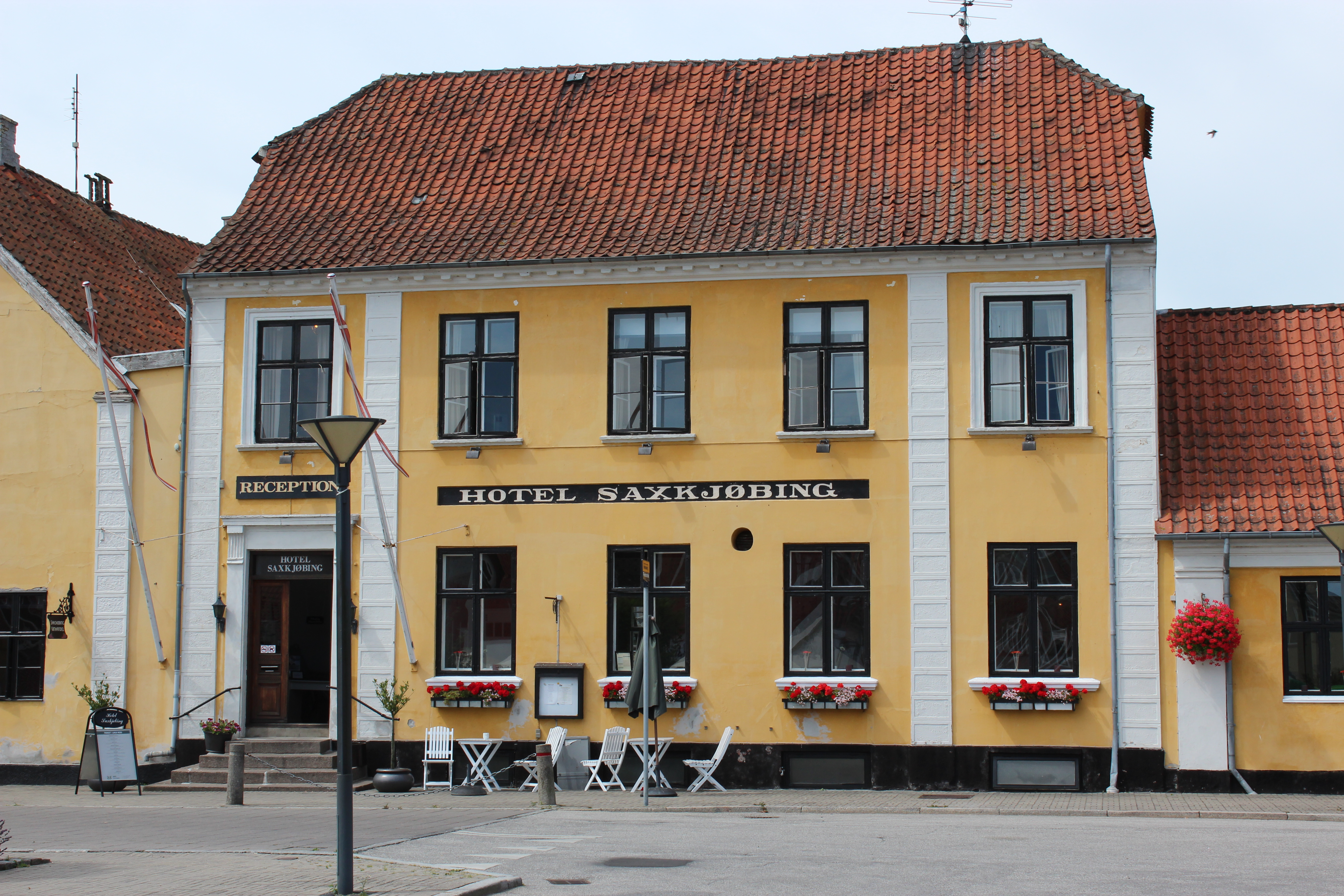 Hotellet fra 1800